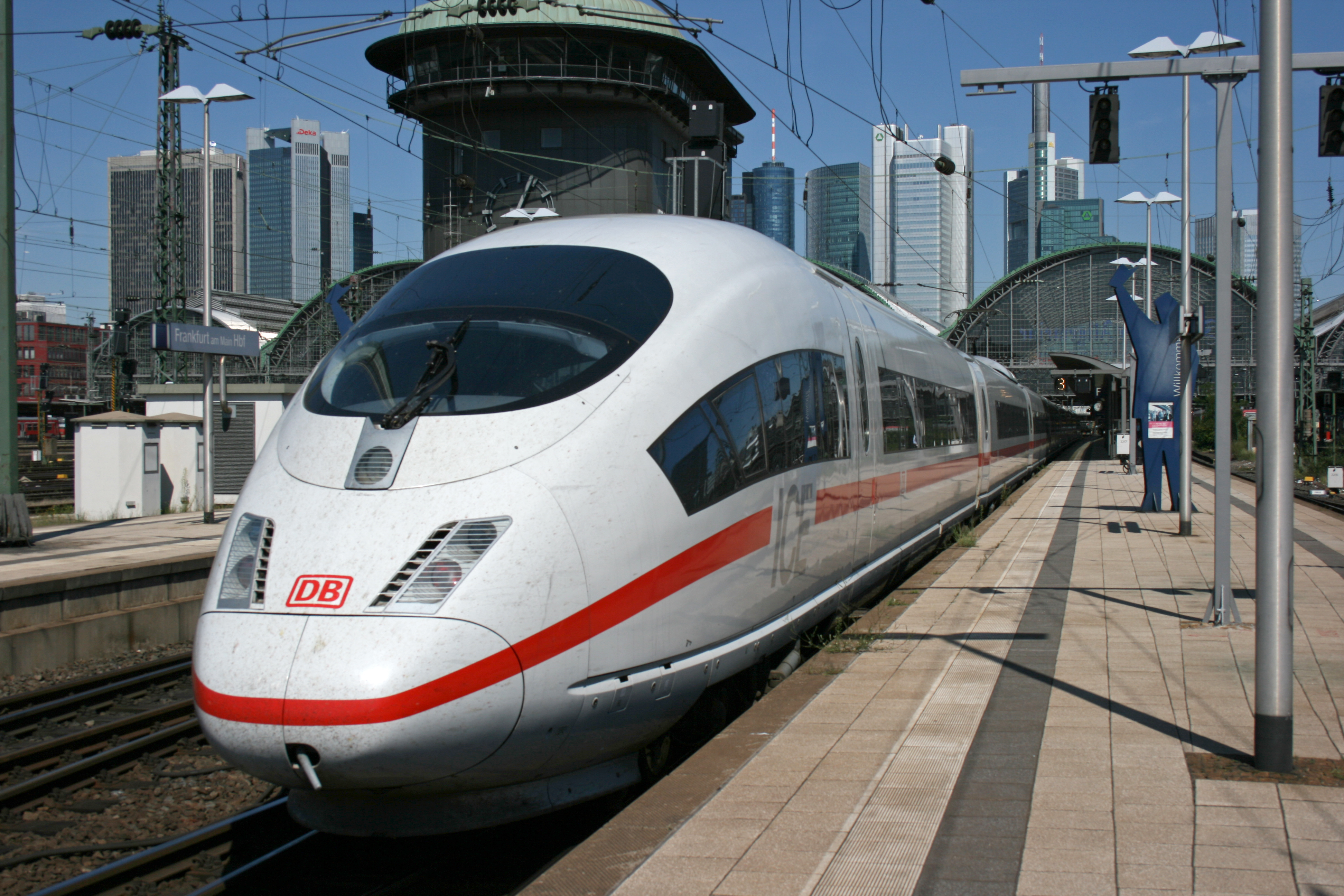 ein ICE im Frankfurter Hauptbahnhof